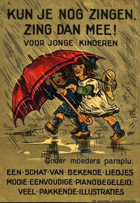 Reclameposter (1915) voor het liedboek "Kun je nog zingen, zing dan mee. Voor jonge kinderen" (1912). Met afbeelding van het liedje 'Onder moeders paraplu'. Deze poster werd als reclame gebruikt op de ramen van de tram. Archief Amsterdam (beeldbank) vermeldt: "Auteursrechtenvrij".